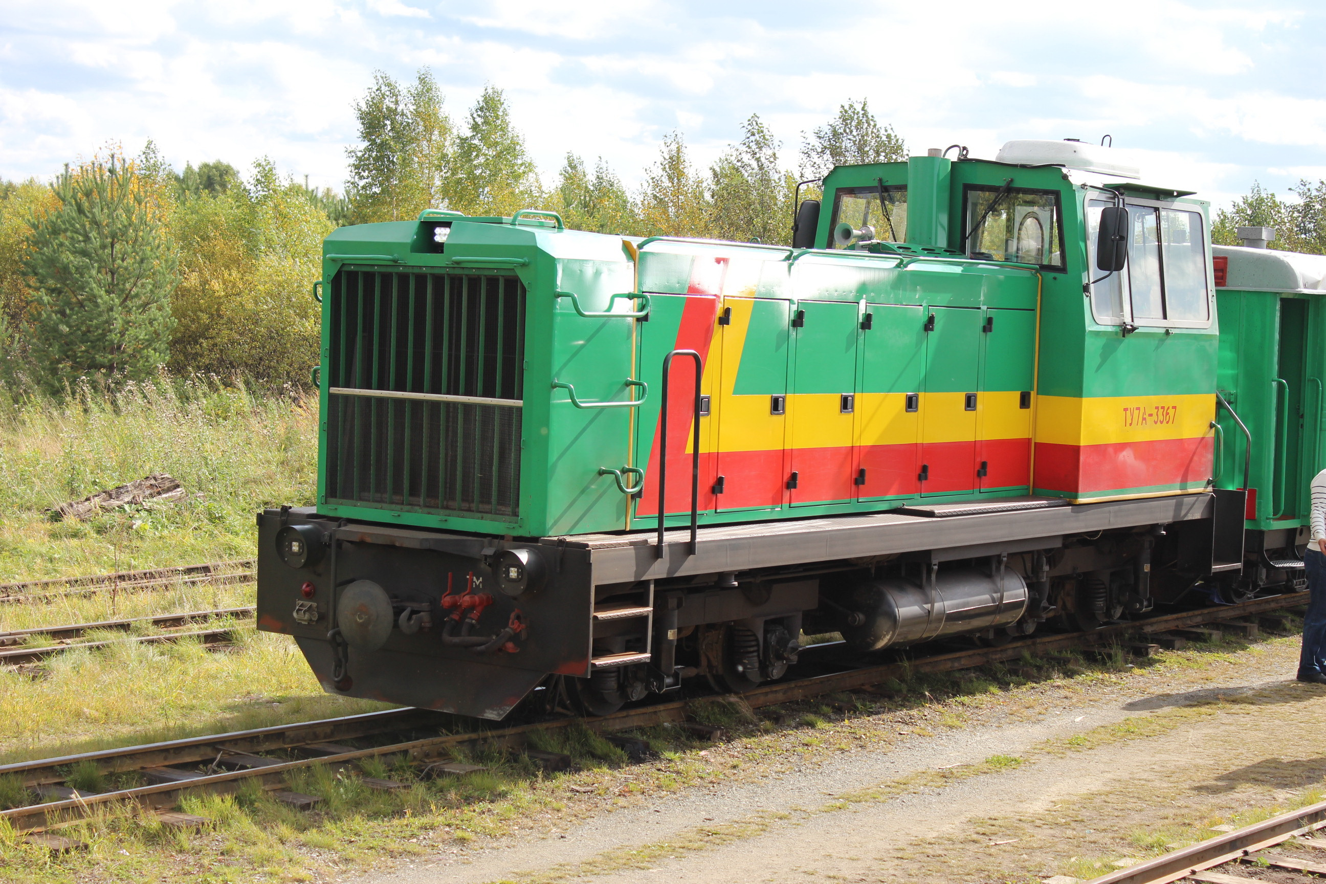 Тепловоз ТУ7А-3367